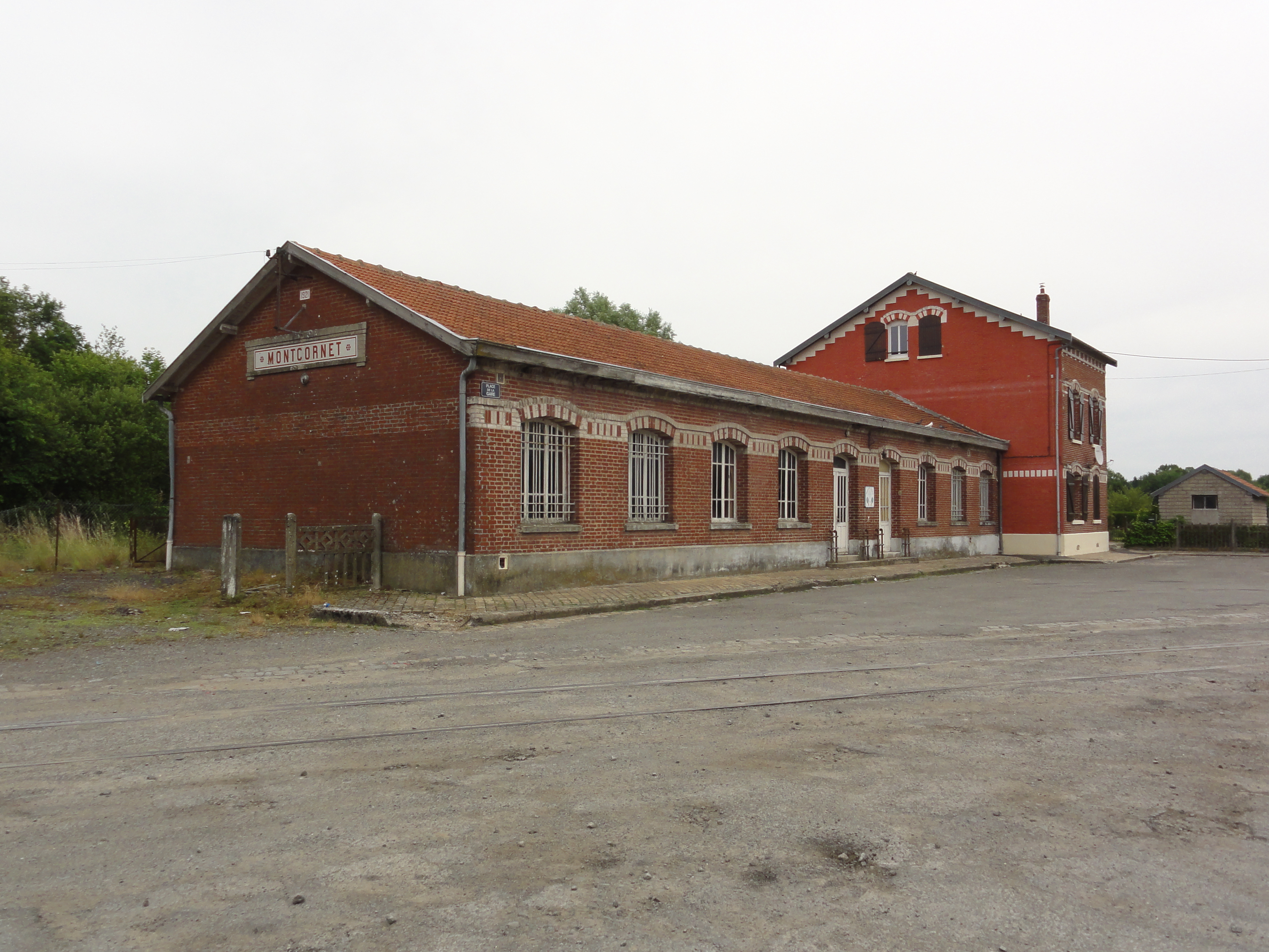 Montcornet (Aisne) gare de Montcornet